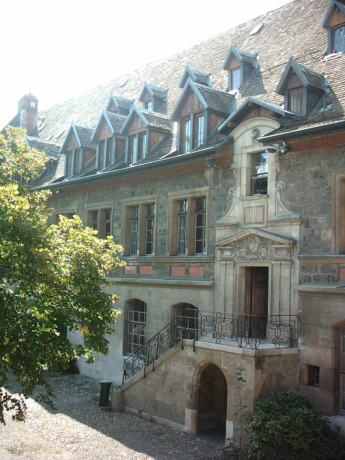 Bâtiment sud du collège Calvin de Genève (Suisse)